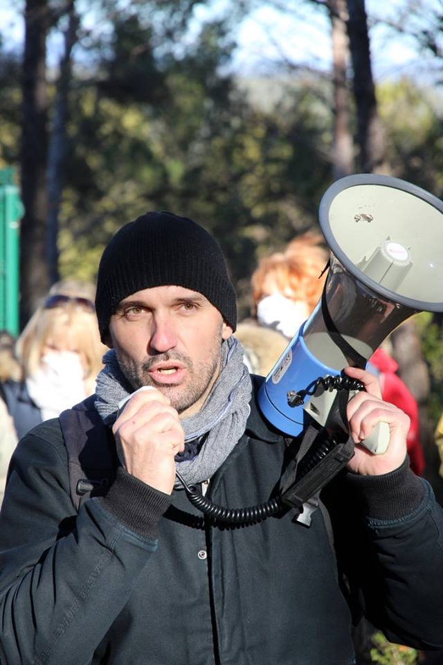 Olivier Dubuquoy lors d'une mobilisation contre les pollutions de boues rouges